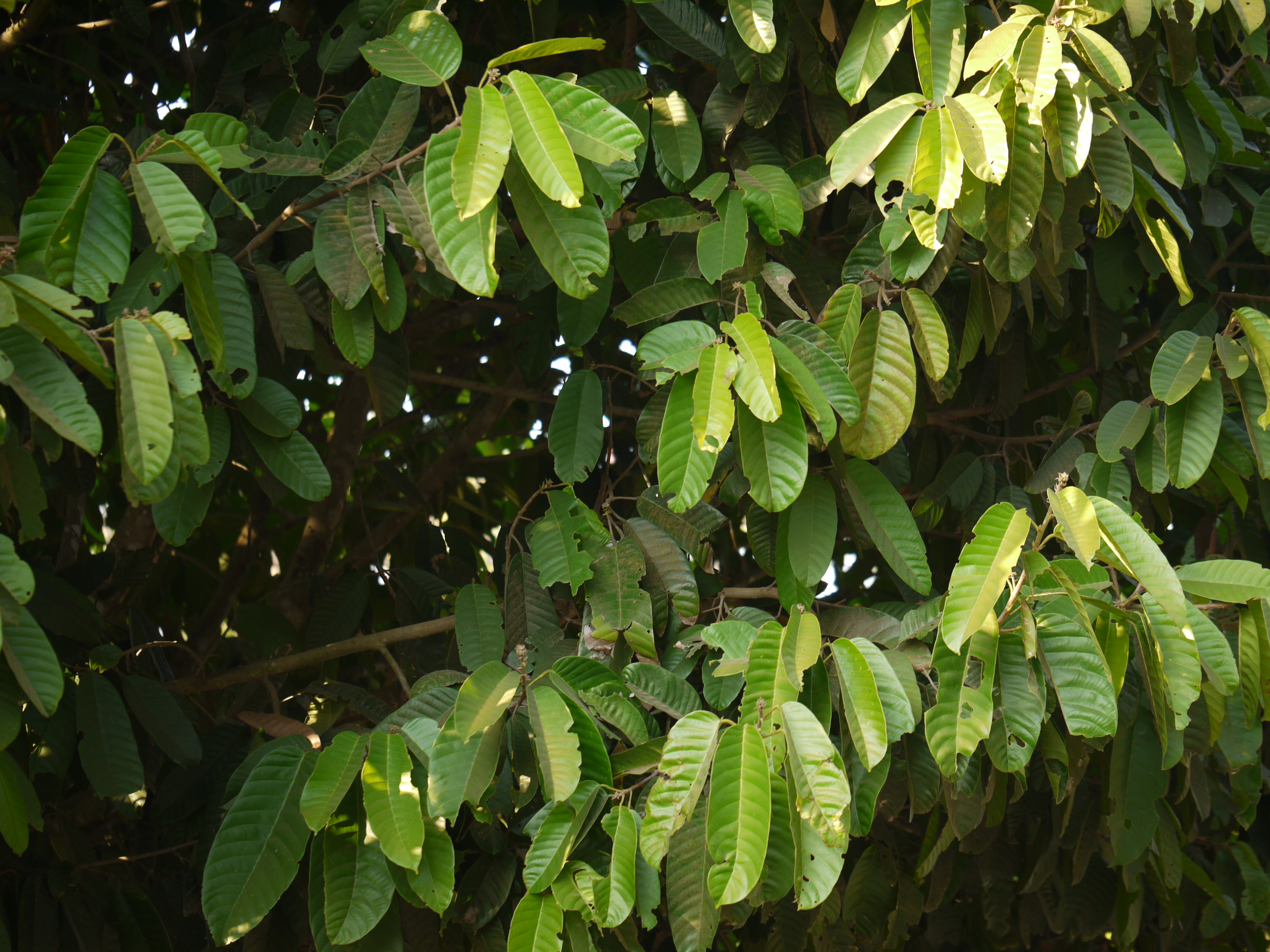 Dipterocarpaceae (sal family) » Vateria indica L. ¿ vah-tay-REE-uh ? -- named for Dr Abraham Vater, German professor of medicine and botany IN-dih-kuh or in-DEE-kuh -- of or from India commonly known as: Indian copal tree, Indian gum anime, Malabar tallow tree, piney varnish tree, white dammar • Hindi: सफेद डामर safed daamar • Kannada: ಬಿಳಿ ಡಾವರು bili daamaru, ಬಿಳಿ ಧೂಪ bili dhupa, ಧೂಪದ ಮರ dhupada mara • Malayalam: കുന്തിരിക്കപ്പൈന്‍ kuntirikkappayin, പയിനി paini, വെള്ളപ്പൈന്‍ vellappayin • Marathi: चंद्रुस chandrusa • Oriya: ମନ୍ଦଧୂପ mandadhupa, ସନ୍ଦରସ sandarasa • Sanskrit: सर्जकः sarjakah • Tamil: துருளக்கம் turulakkam, வெள்ளைக்குங்கிலியம் vellai-k-kunki-liyam • Telugu: తెల్లగుగ్గిలము tellaguggilamu Endemic to: c & s Western Ghats (of India) References: Biotik • ENVIS - FRLHT • Further Flowers of Sahyadri by Shrikant Ingalhalikar